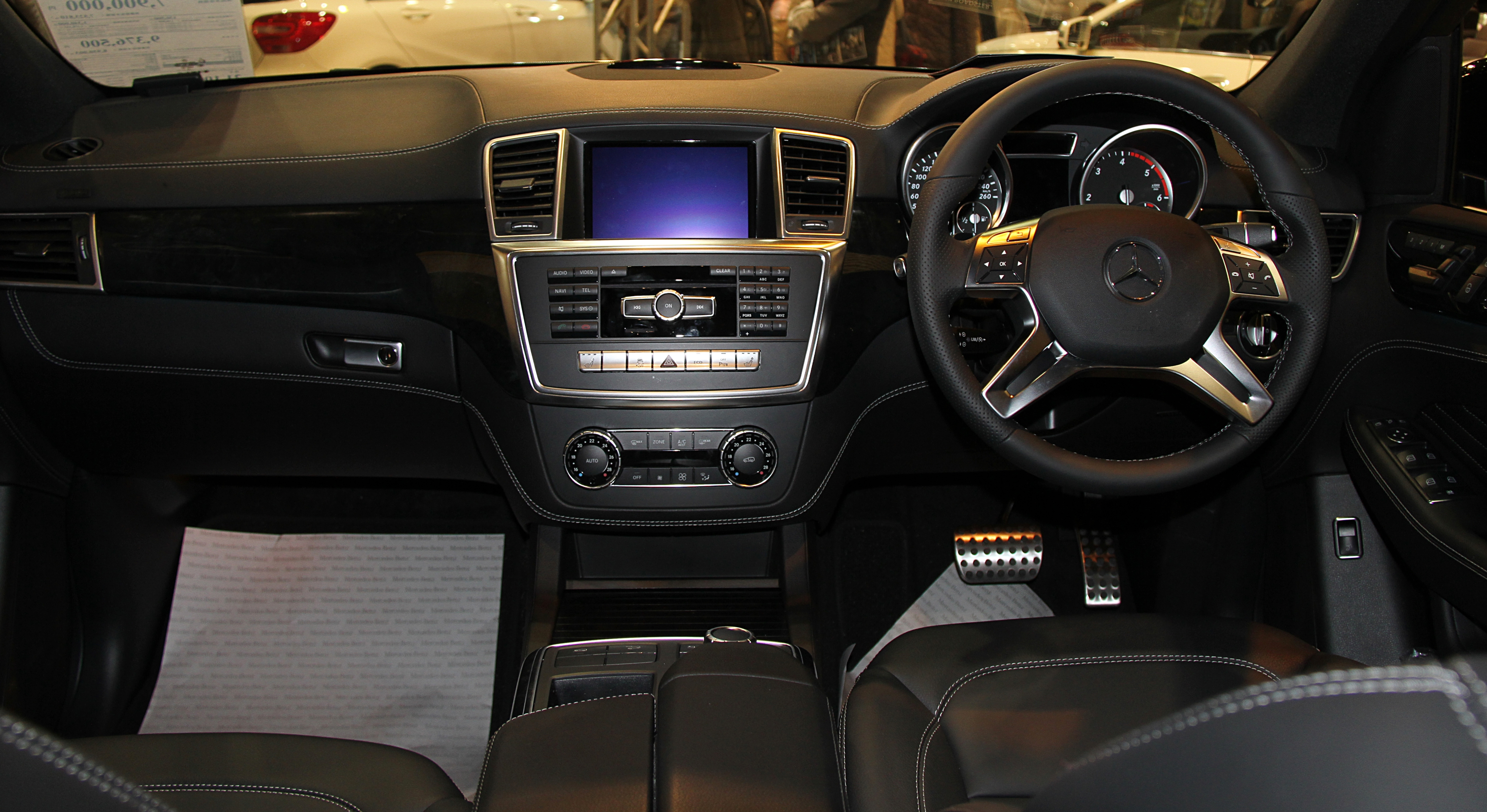 Mercedes-Benz LDA-166024